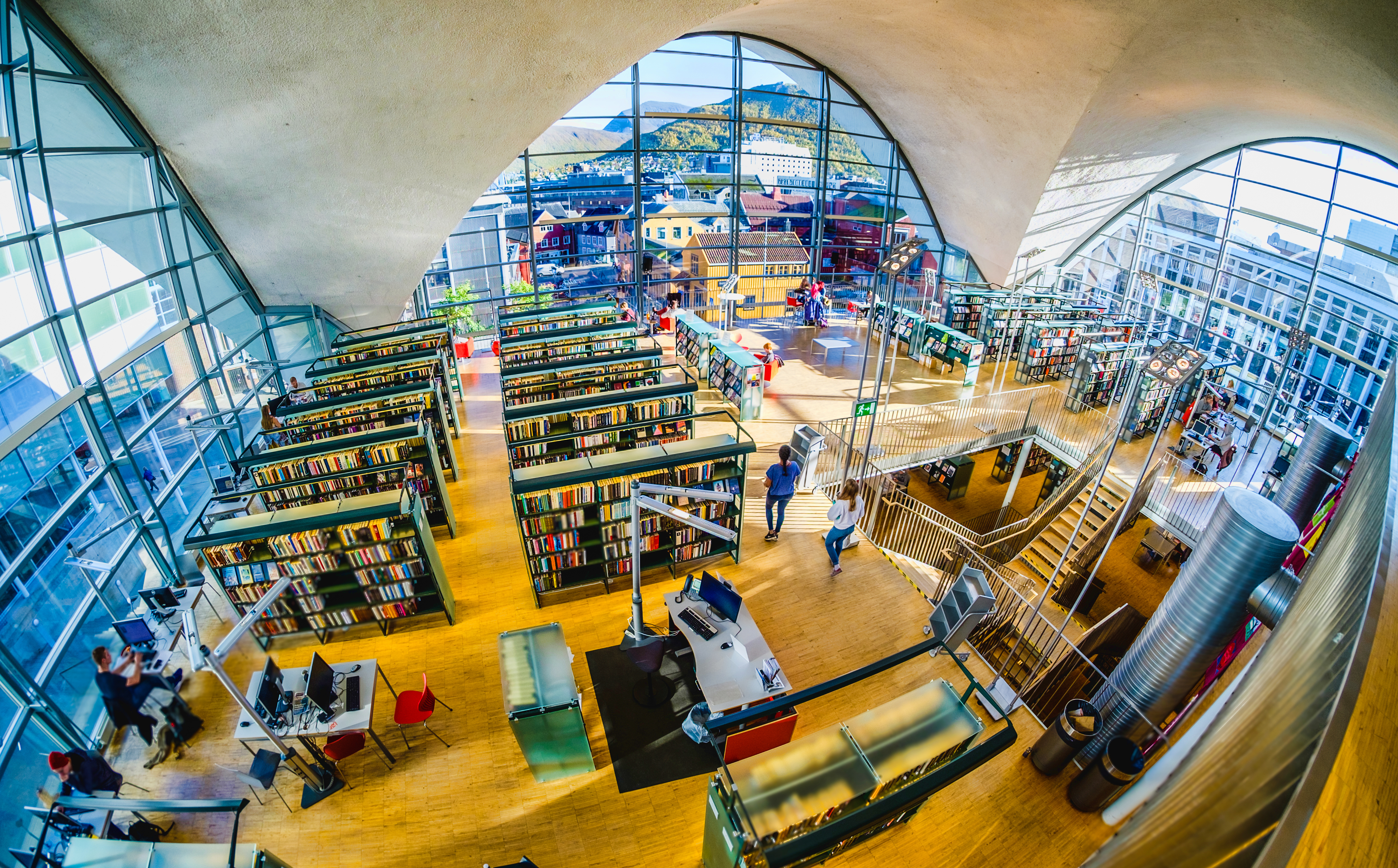 Utsikten fra plan 2 på Tromsø bibliotek og byarkiv, mot Storgata og Tromsdalen.